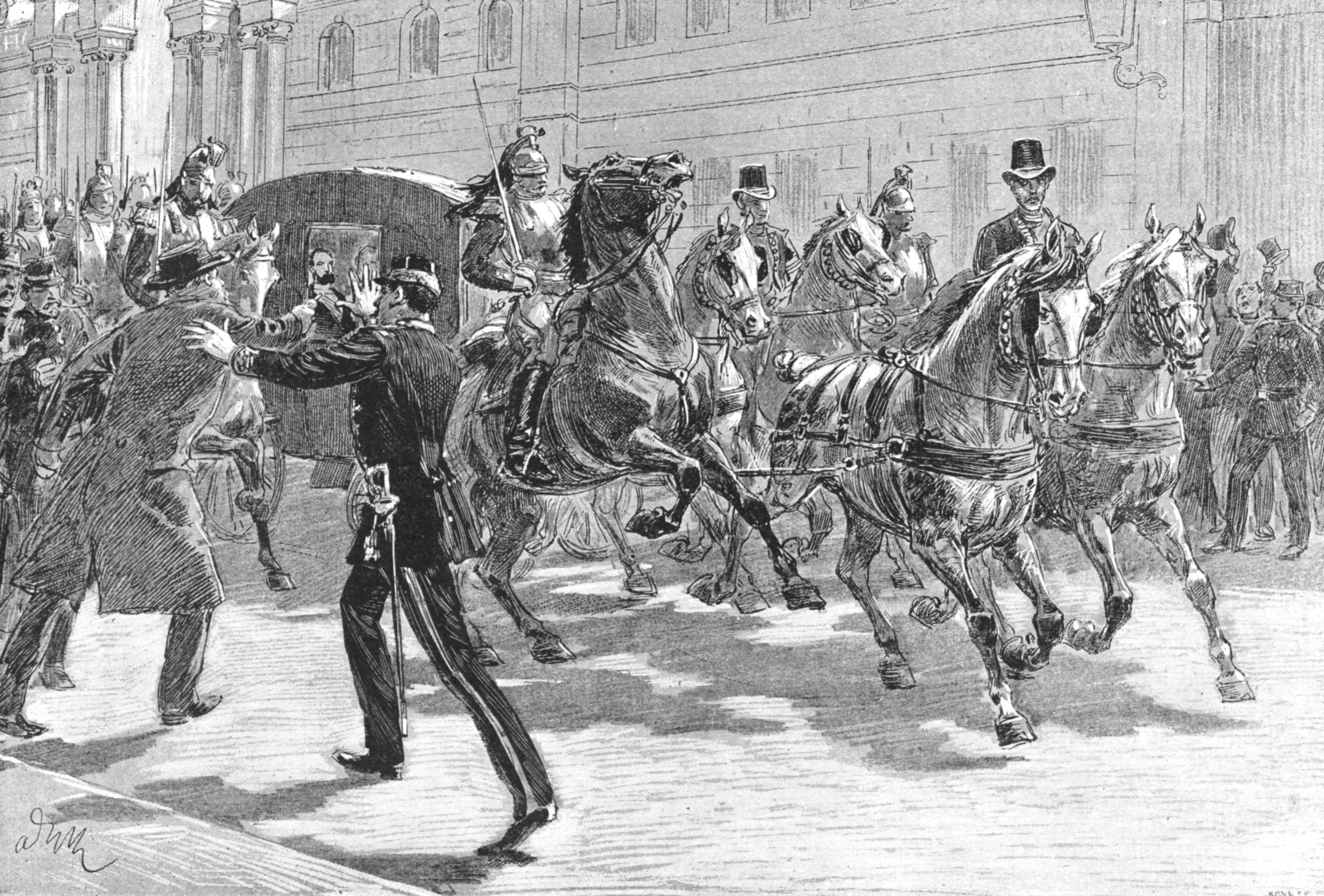 "Attentat contre M. Carnot à sa sortie de l’Élysée, le 5 mai. (Dessin de M. Adrien Marie, d'après le croquis de M. L. Bombled, témoin oculaire.)"